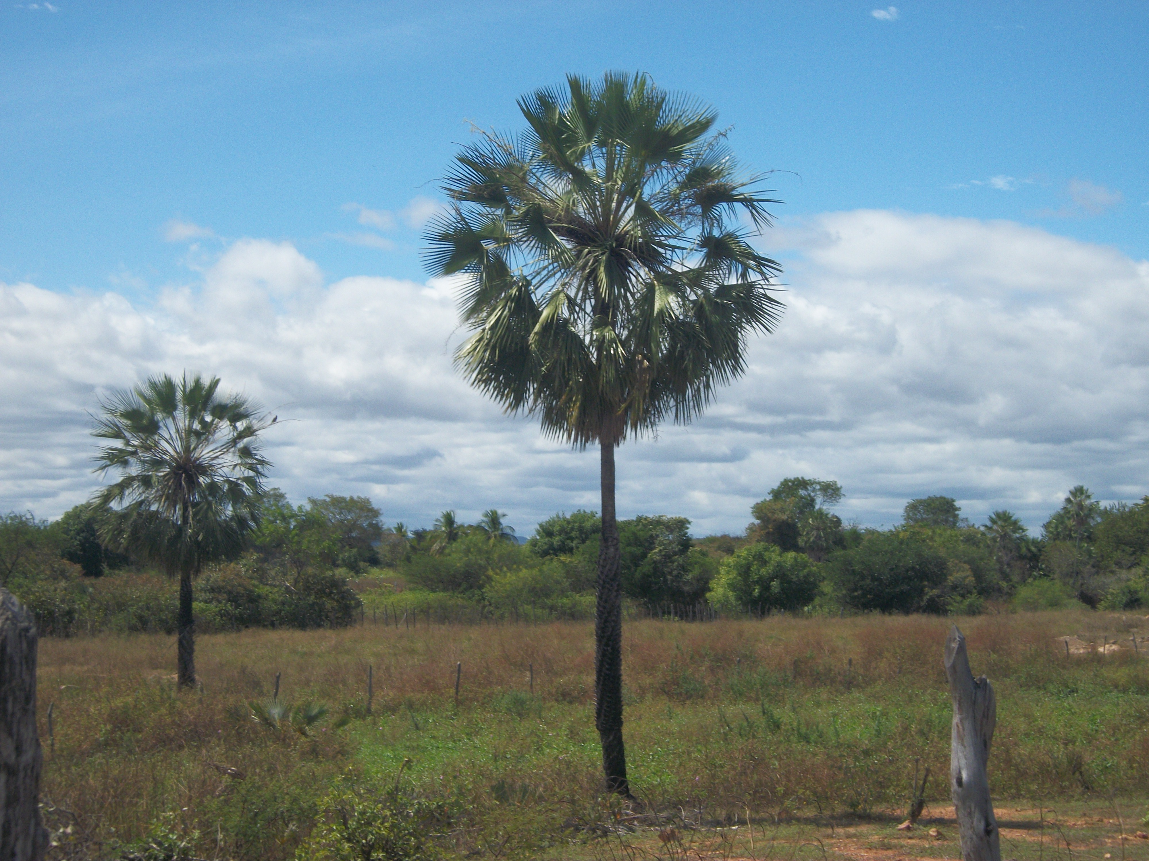 Carnaúba, a árvore da vida